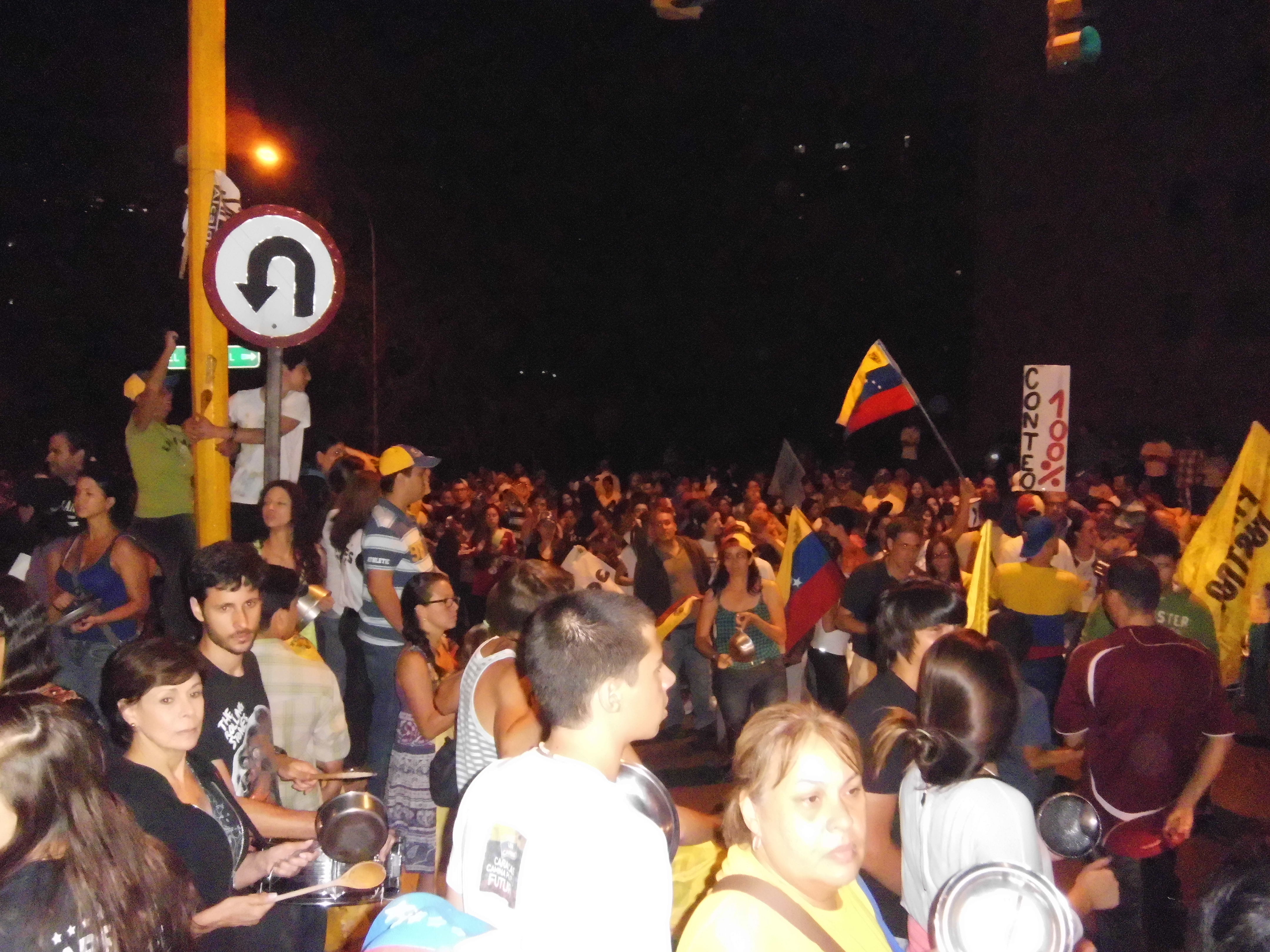 Cacerolazo contra Nicolás Maduro - La Boyera Municipio el Hatillo, Estado Miranda Venezuela día 15 de abril de 2013 hora 8:30 a 9:30 pm